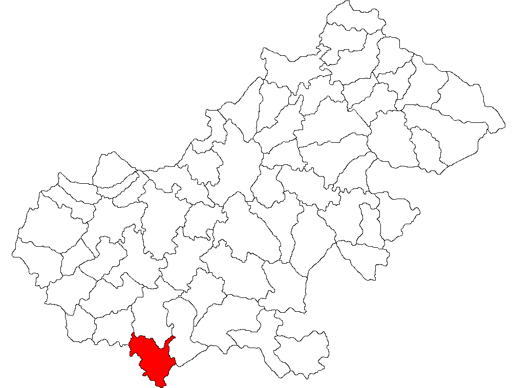 Categorie:Hărţi ale judeţului Satu Mare